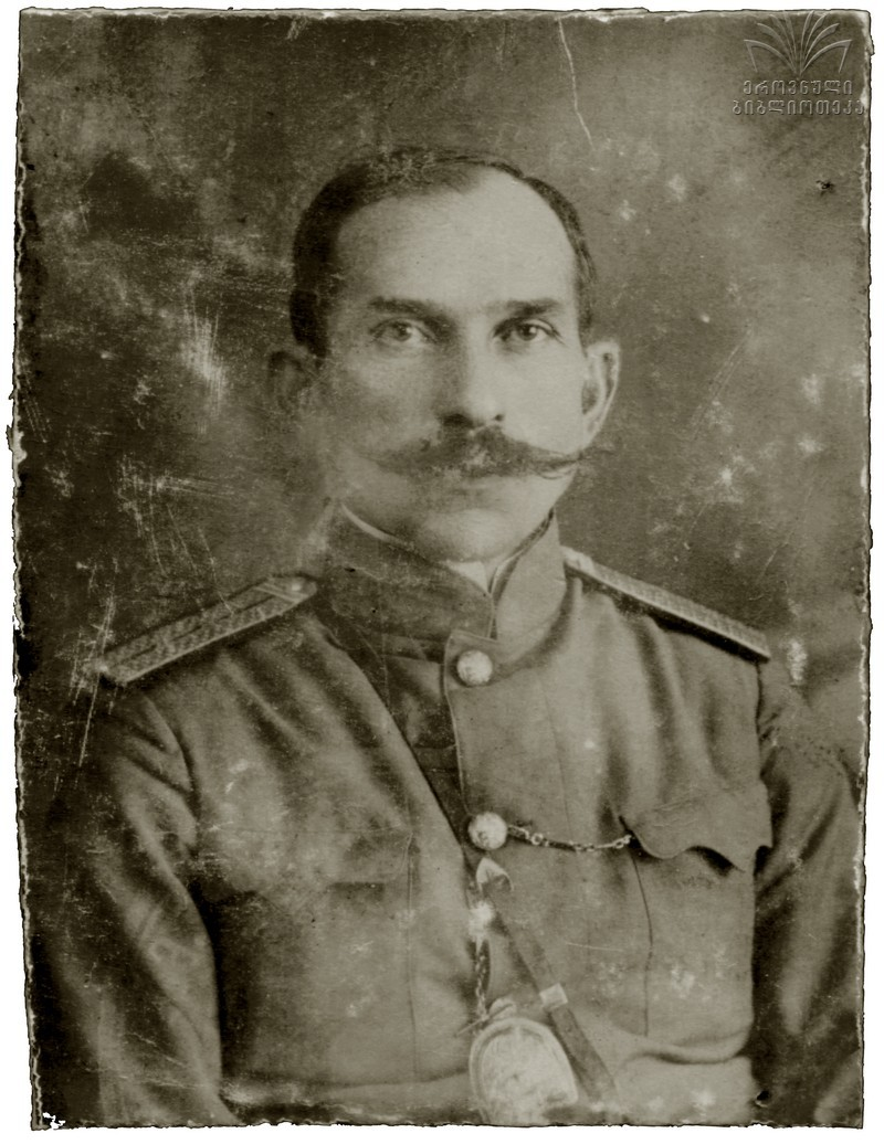 Gen. Giorgi Mazniashvili (1872 -1937)